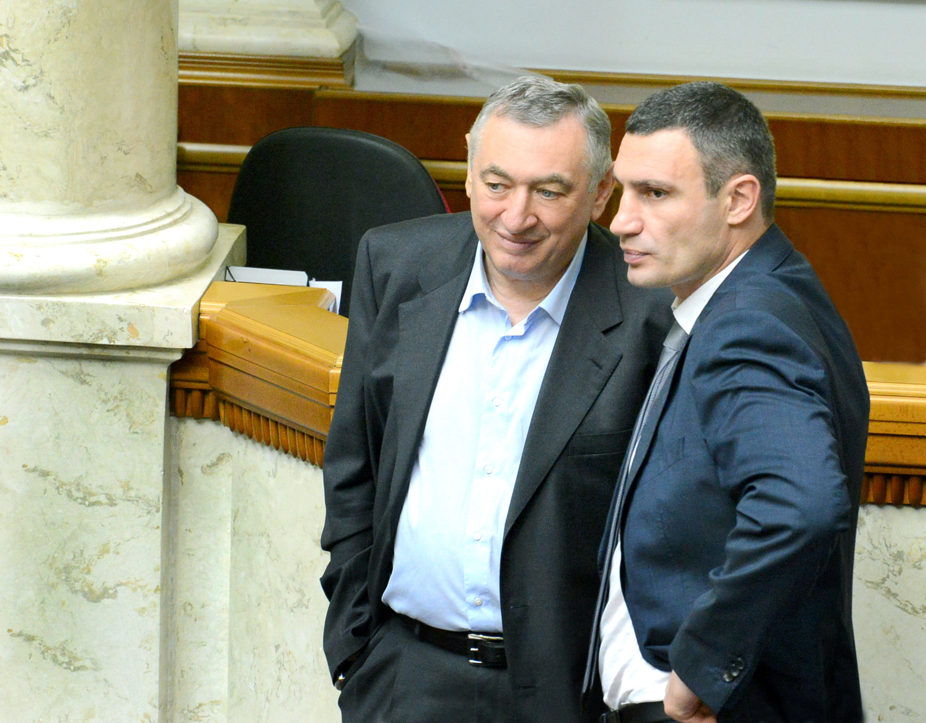 Эдуард Гурвиц и Виталий Кличко в Верховной Раде Украины , фото Вадим Чуприна, 2013-06-21